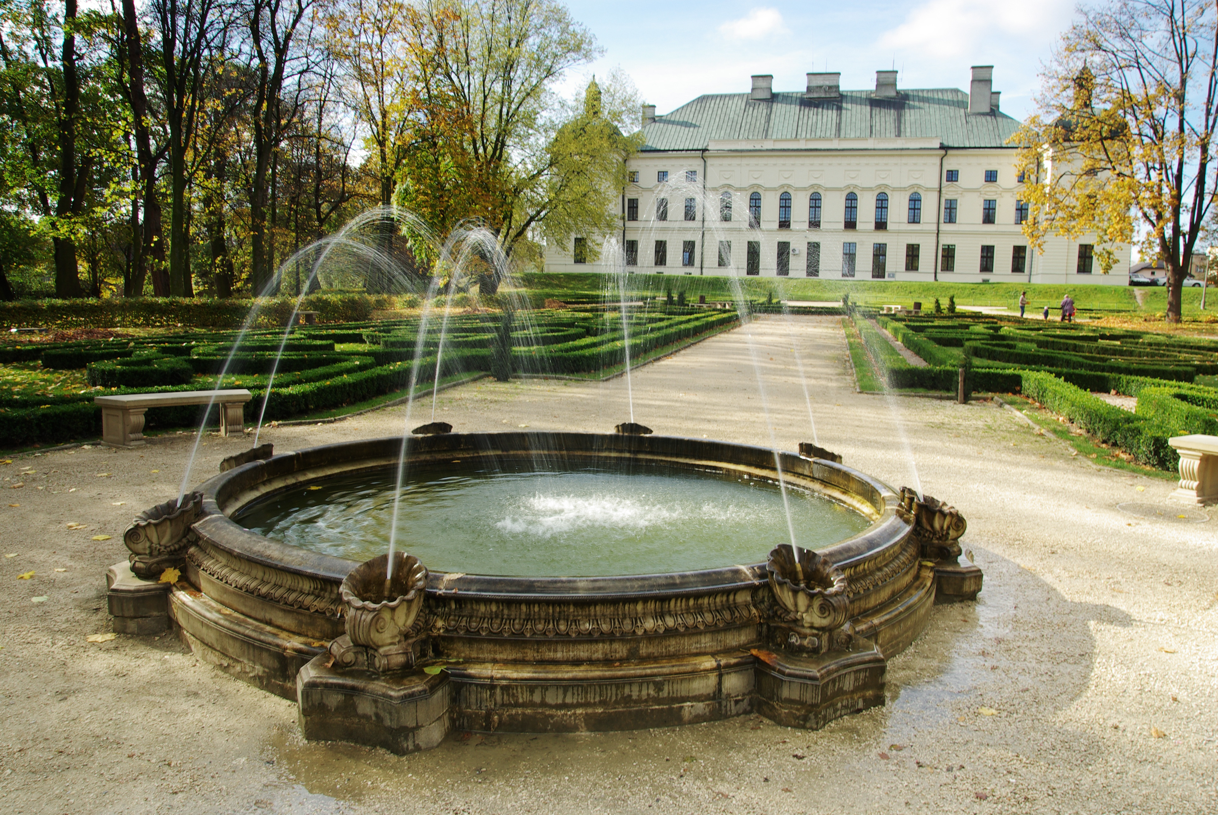 Fontanna w lubartowskim parku